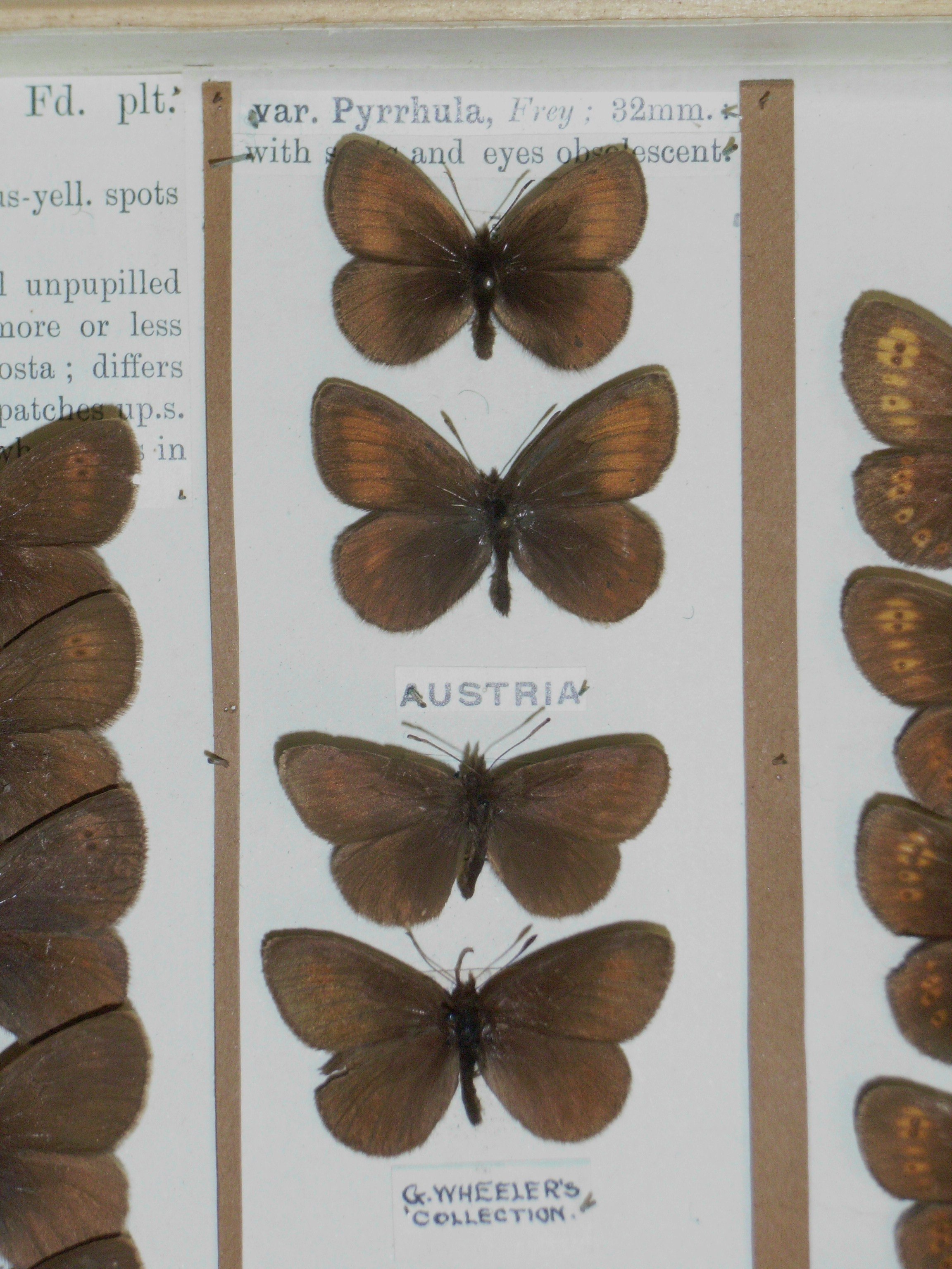 Erebia manto var. pyrrhula (not a subspecies but a developmental aberration)